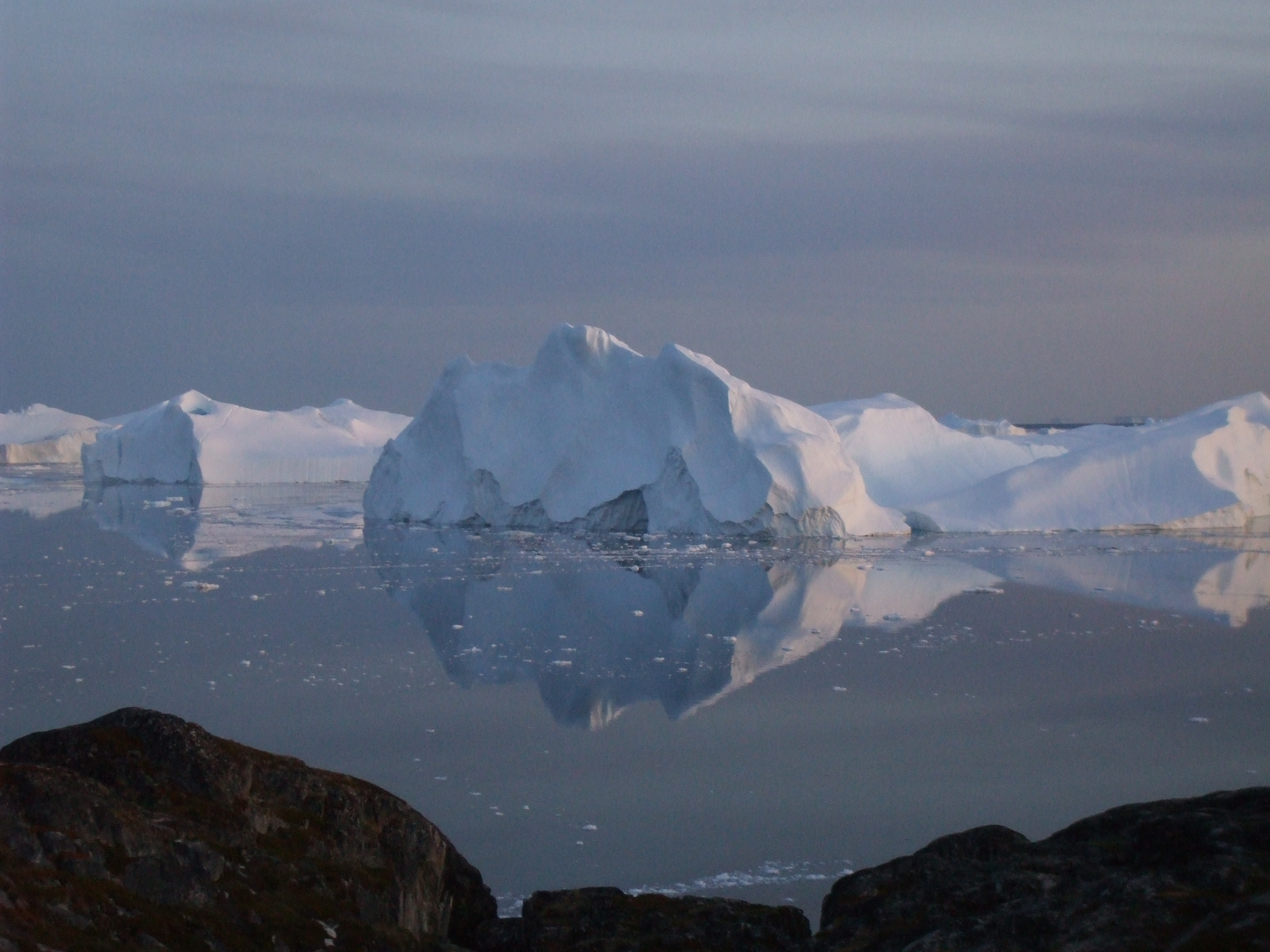 Ilulissat 5 Icebergs Groenland 2009 Expédition ACarré